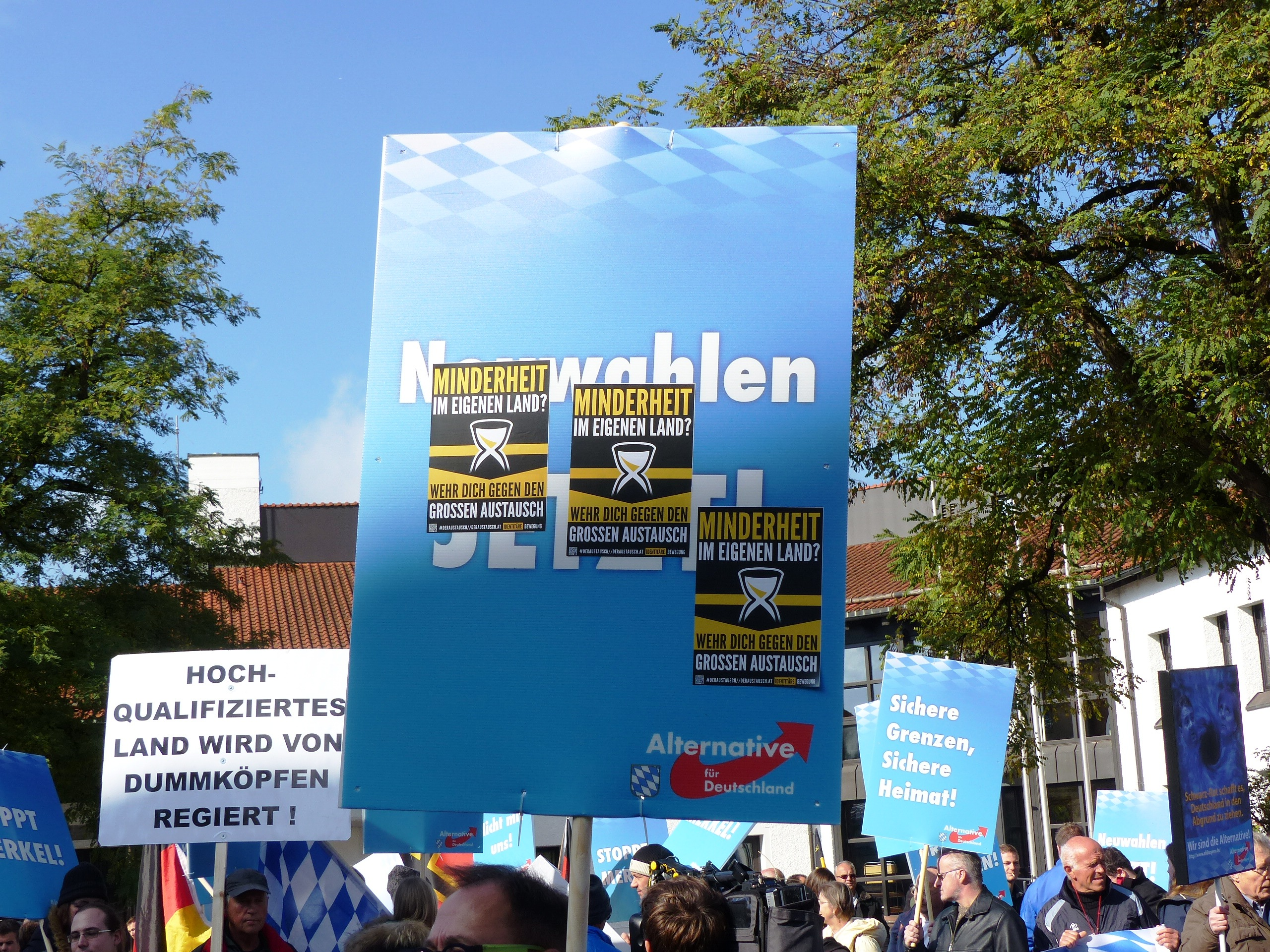 Sticker der Identitären Bewegung auf einem Schild bei einer AfD-Demo in Freilassing